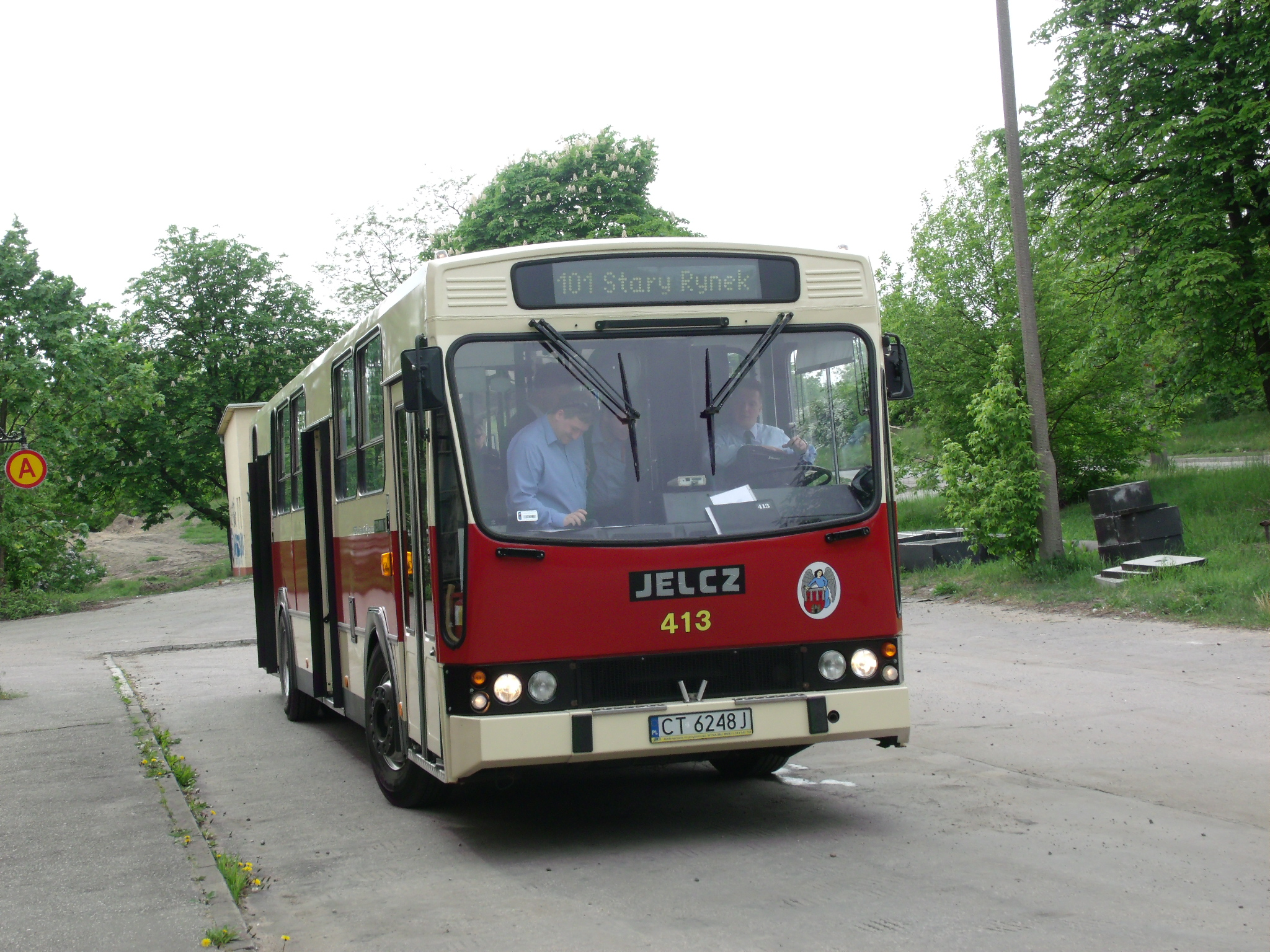 Jelcz w Bydgoszczy - Noc Muzeów 2015r.